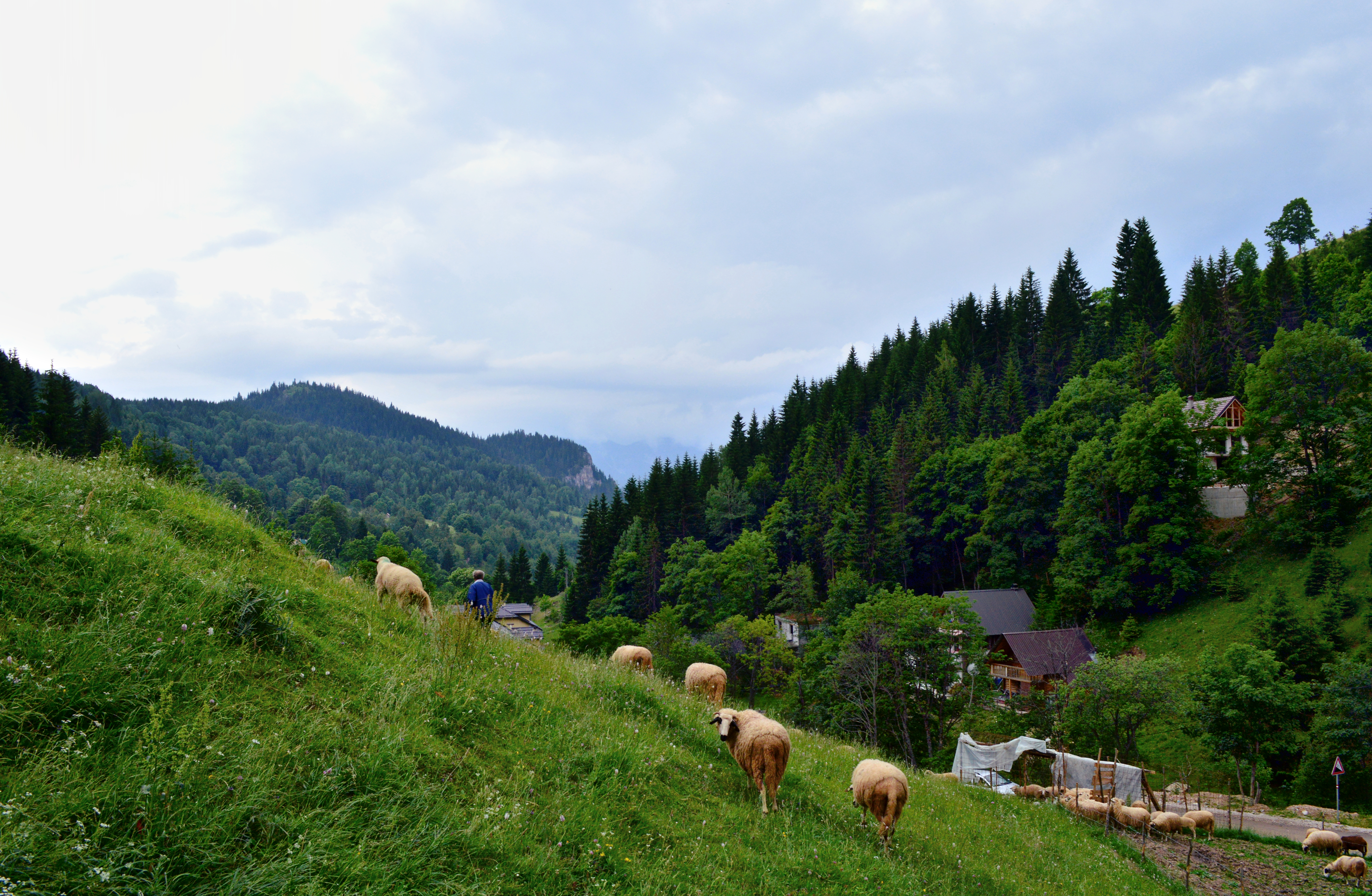 Gryka e Rugovës, Pejë